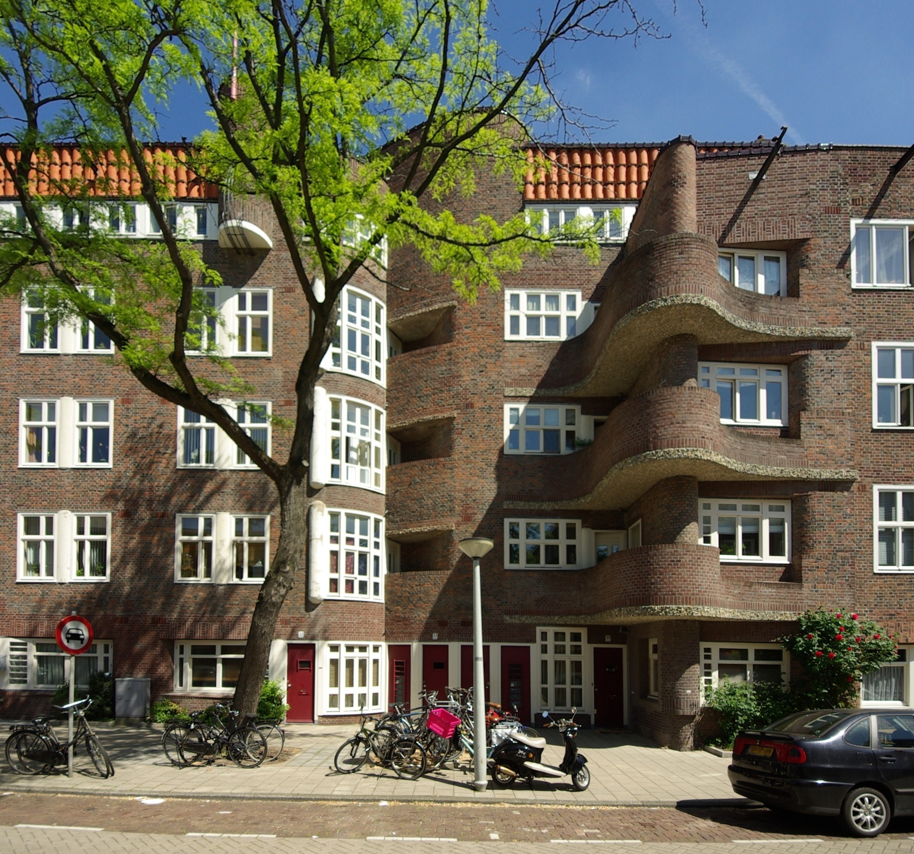 Woonhuis Holendrechtstraat 1-47 (1922/23), Amsterdam, architect: Margaret Staal-Kropholler